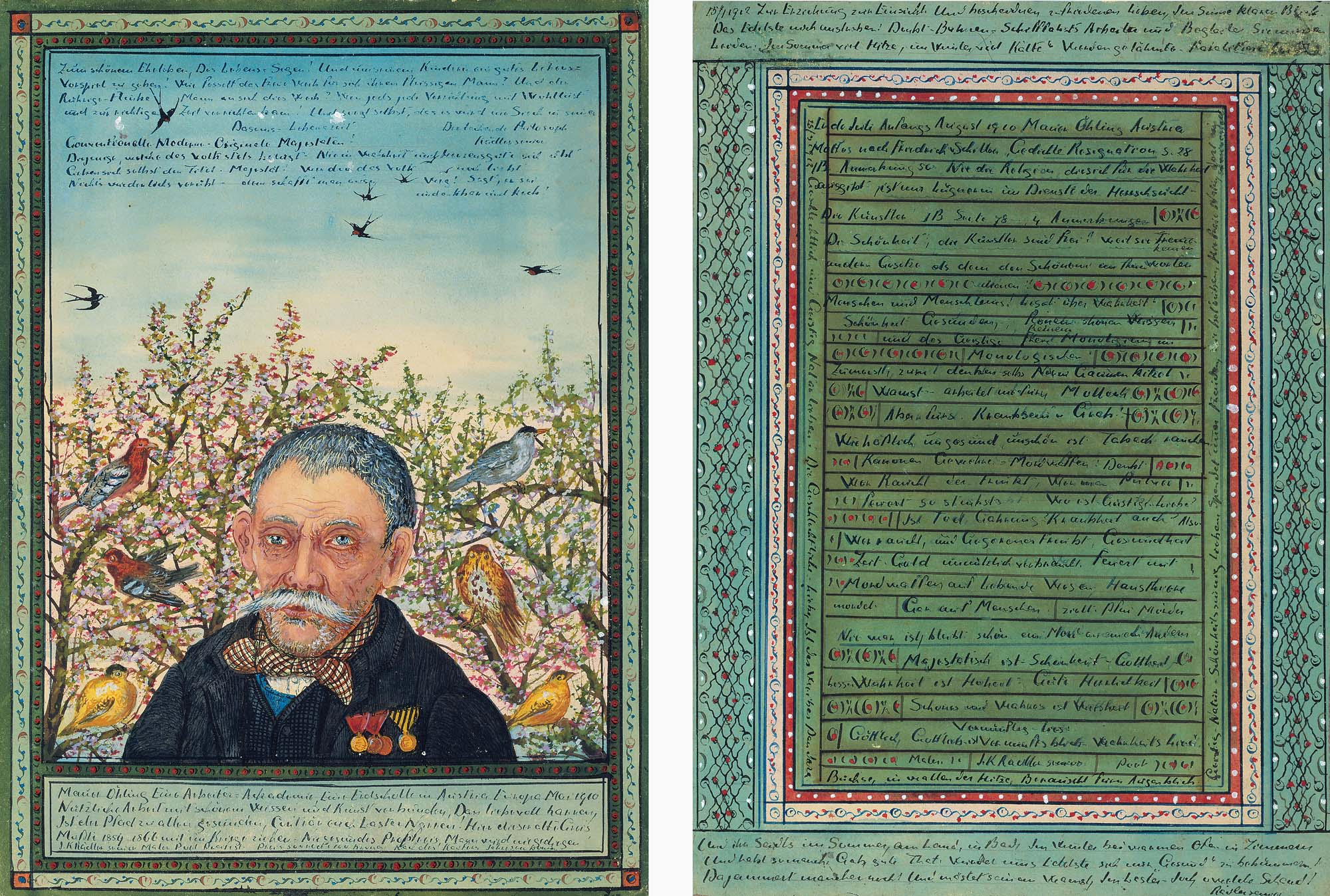 Josef Karl Rädler (1844—1917). R-V.1202. L’association abcd (art brut connaissance & diffusion).